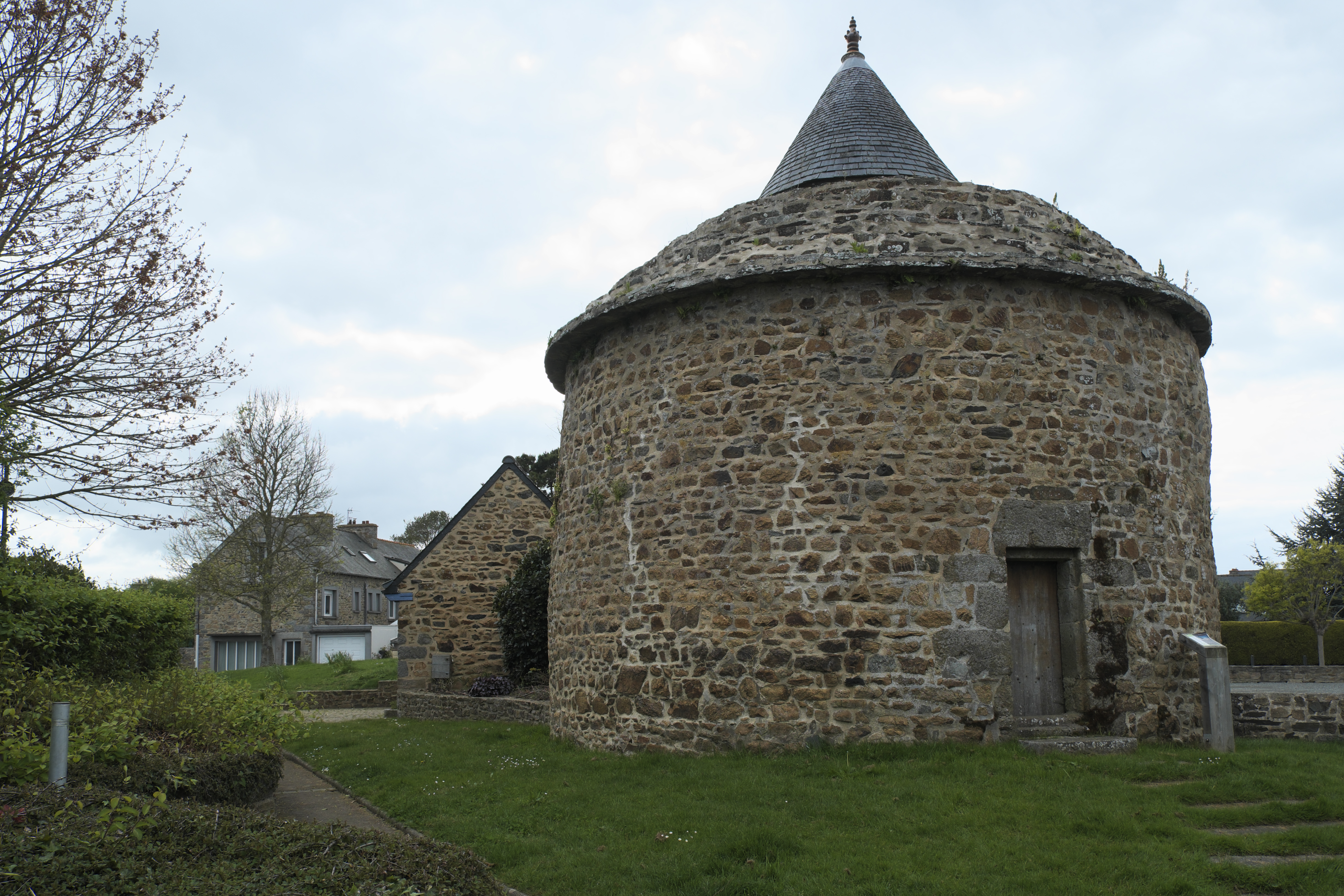 Taubenturm in Hillion im Département Côtes-d’Armor (Region Bretagne/Frankreich)